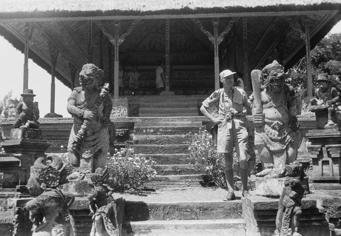 negatief. Nederlandse militair voor de Kerta Gosa